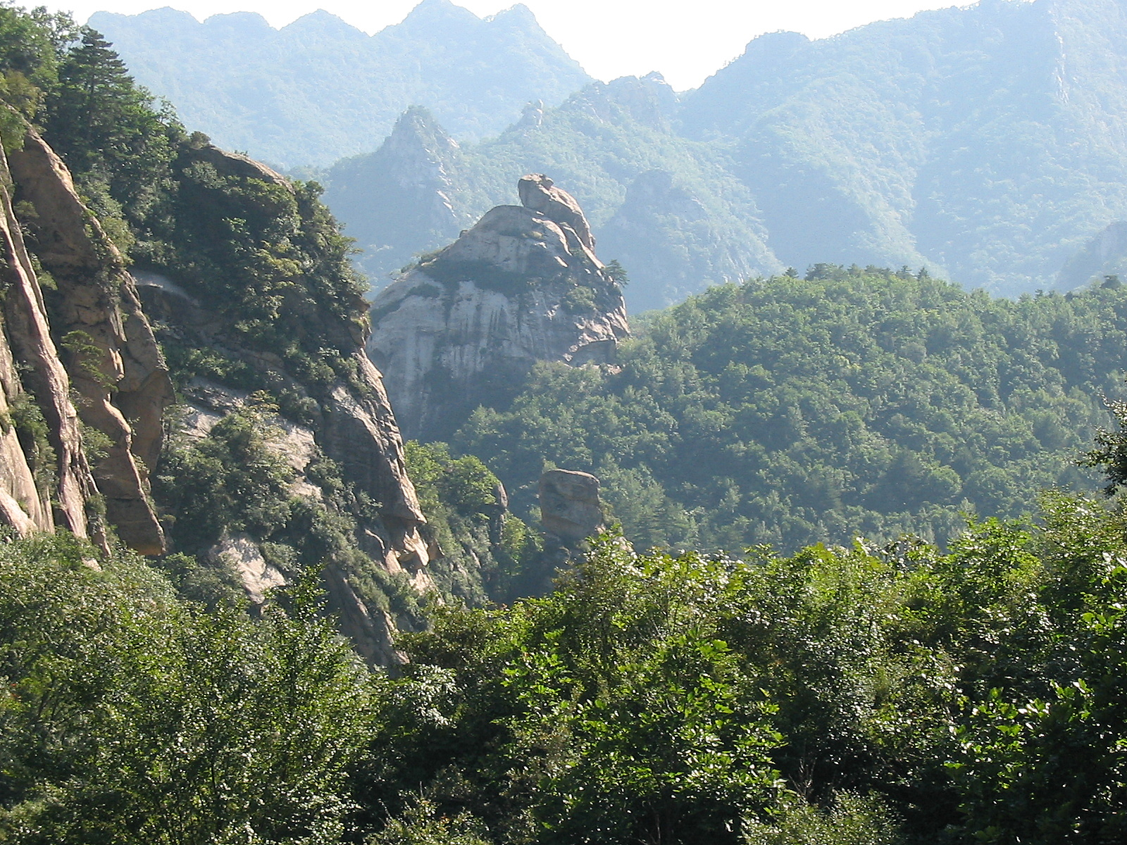 云蒙山 - 青蛙王子